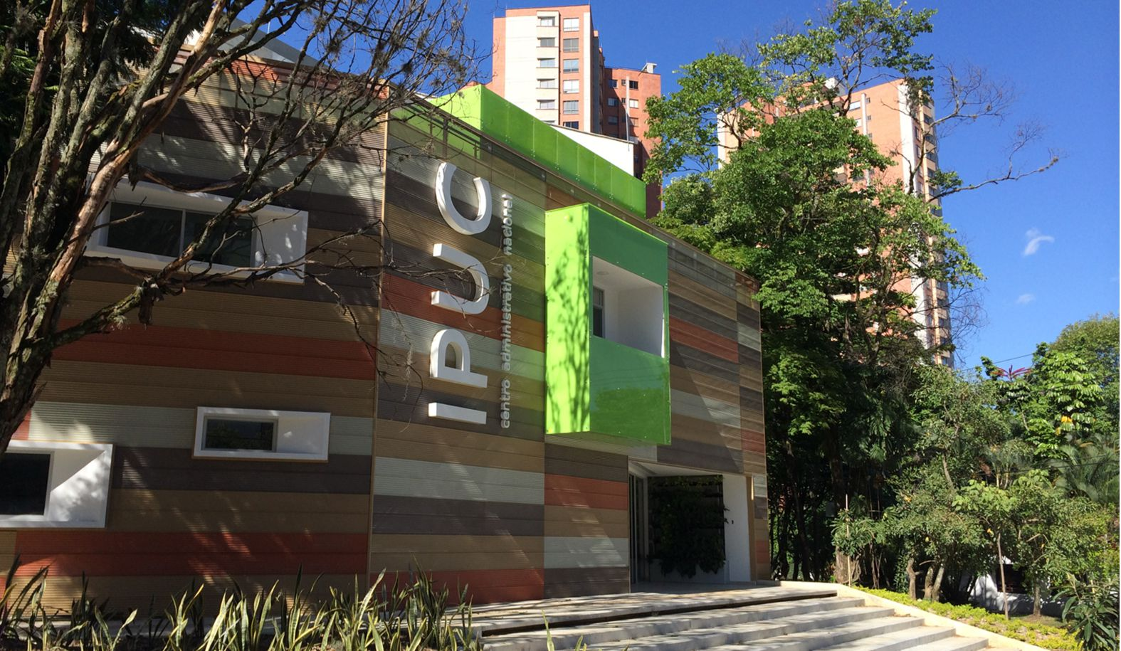 Ipuc